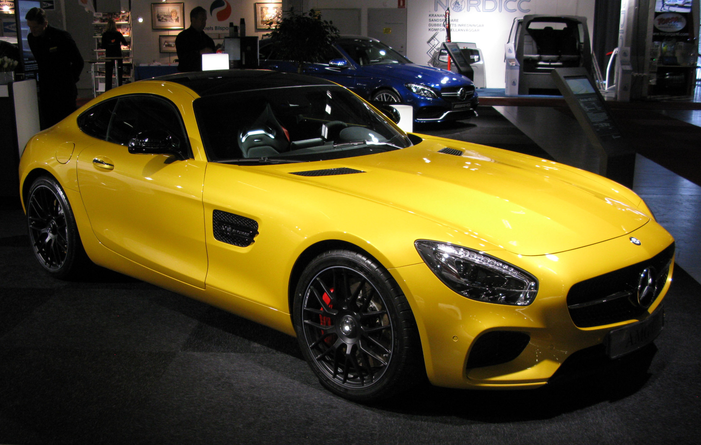 Mercedes-AMG GT